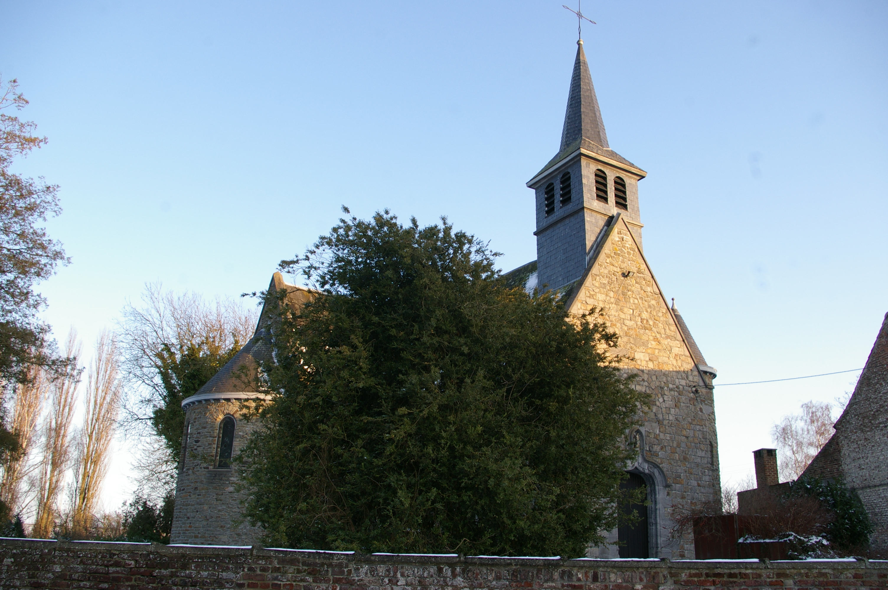 Eglise sainte Aldegonde de Noirchain (Belgique)